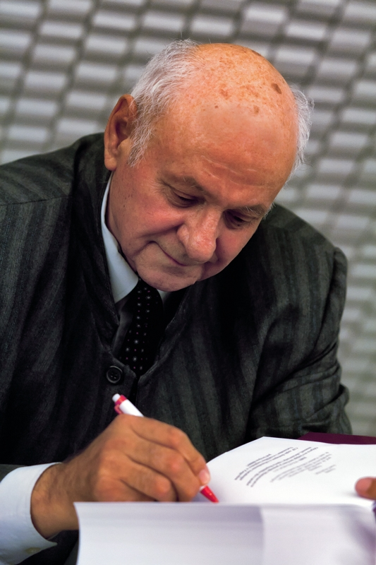 Predstavljanje knjige Ivana Branka Šamije Rječnik jezika hrvatskoga